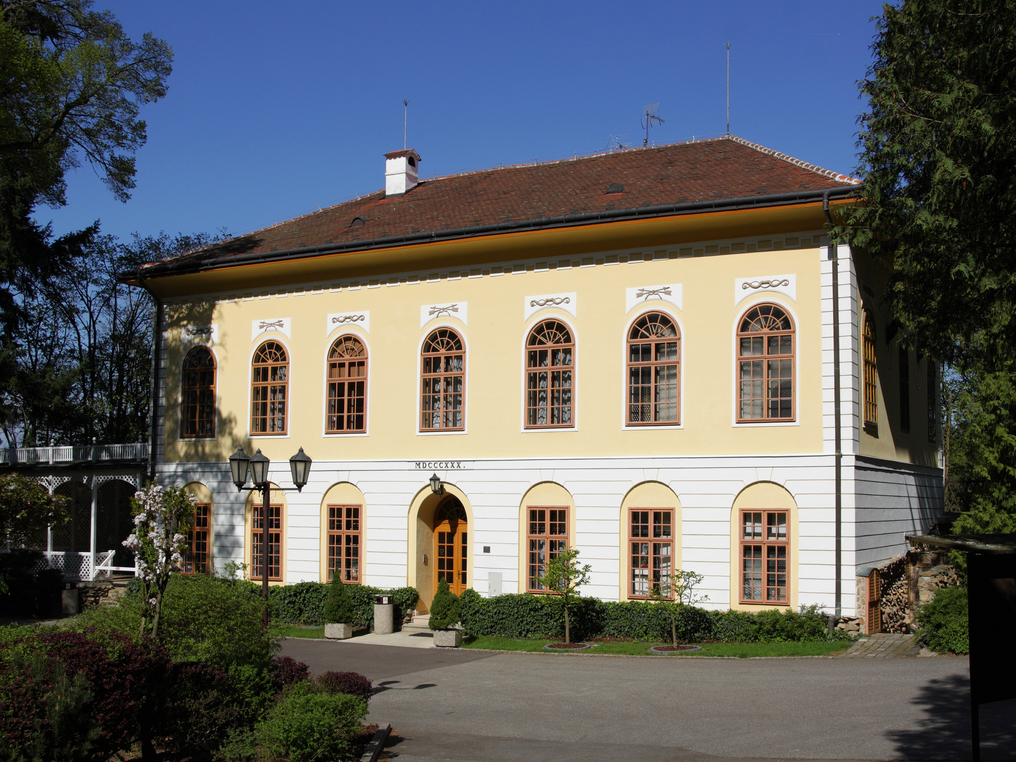 Kladeruby nad Oslavou - zámeček na Vlčím kopci.